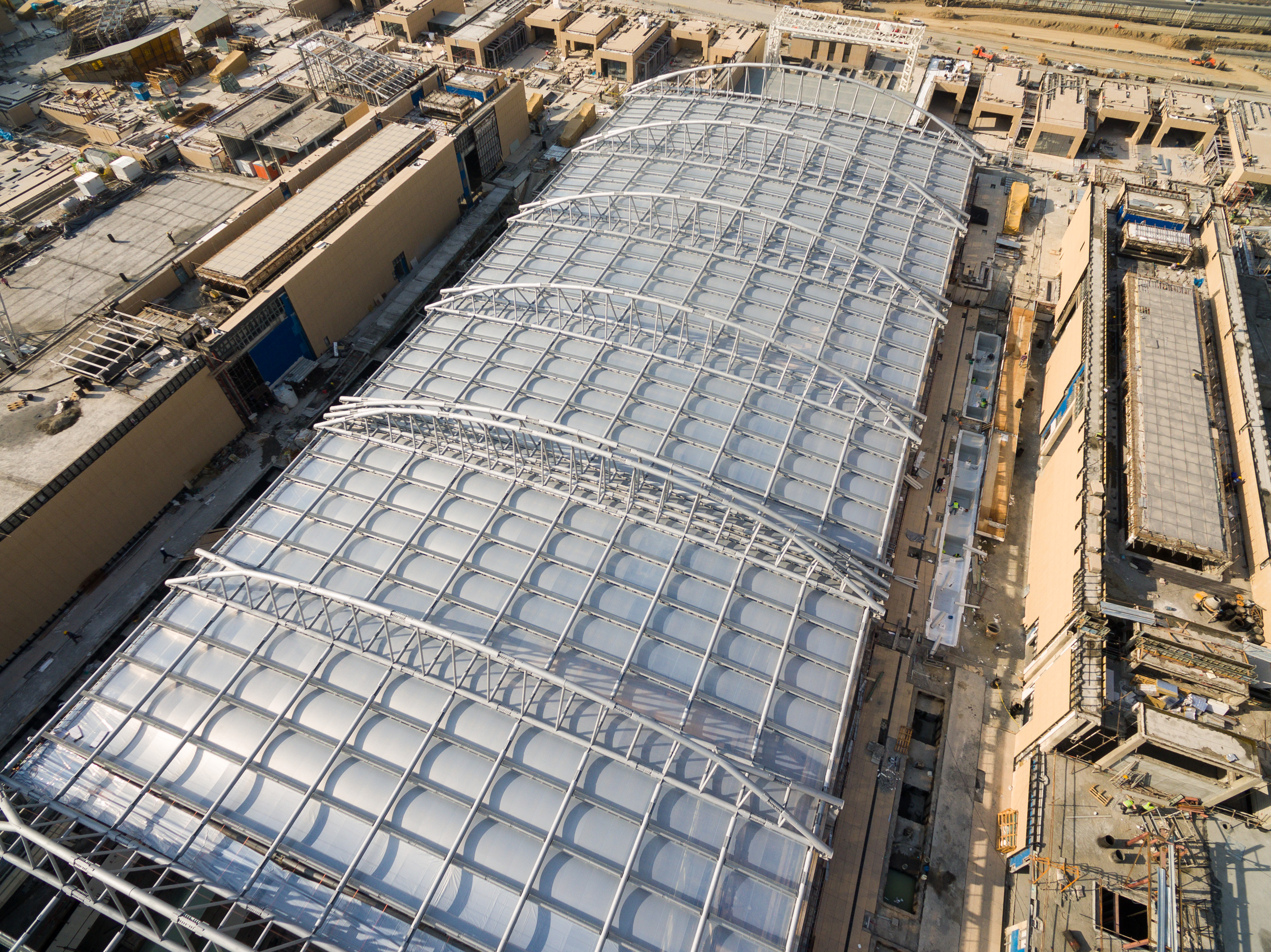 سازه فلزی و پوشش ای‌تی‌اف‌ای سقف باغ ایرانی ایران مال اجرا شده توسط شرکت سازه های پارچه ای دیبا